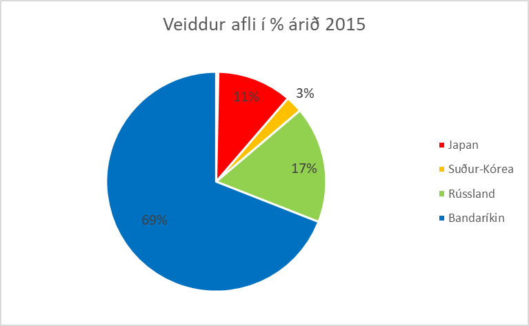 Veiddur afli í % árið 2015